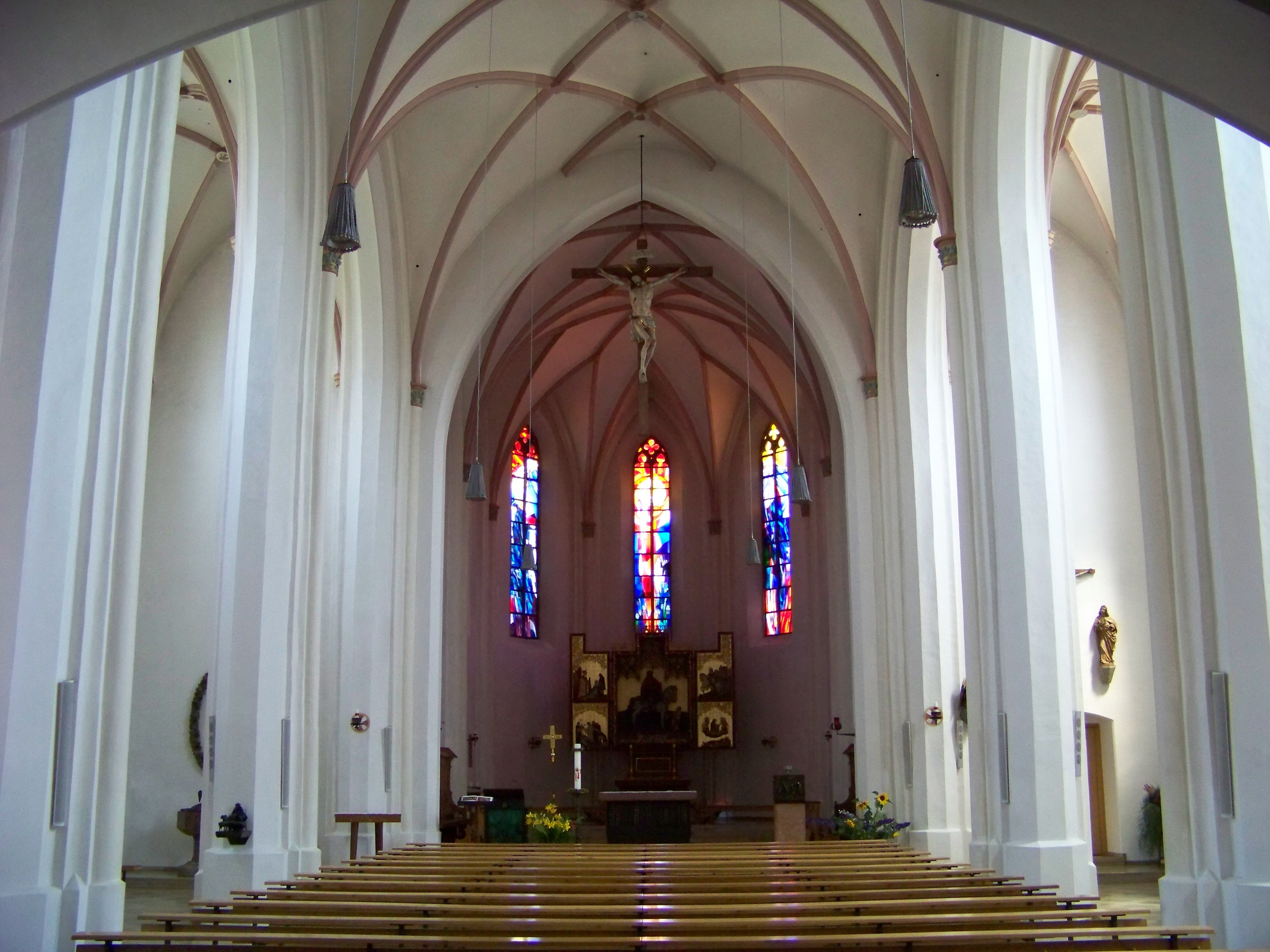 Geisenhausen, Martin-Zeiler-Straße 2. Katholische Pfarrkirche St. Martin, Mauer und Friedhof. Hallenkirche, spätgotischer Backsteinbau der Landshuter Bauhütte, Baubeginn um 1477, Turmobergeschosse nach 1547, Barockisierung 1688 mit Anbau der sogenannten Altöttinger Kapelle, 1852 und 1870 Regotisierung, Gliederung durch umlaufenden Sockel, Strebepfeiler und Dachfries, viergeschossiger Westturm mit achteckigem Aufsatz und Spitzhelm; mit Ausstattung. Mittelschiff.